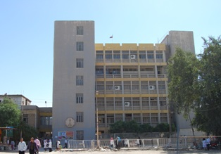 صورة من الاعلى